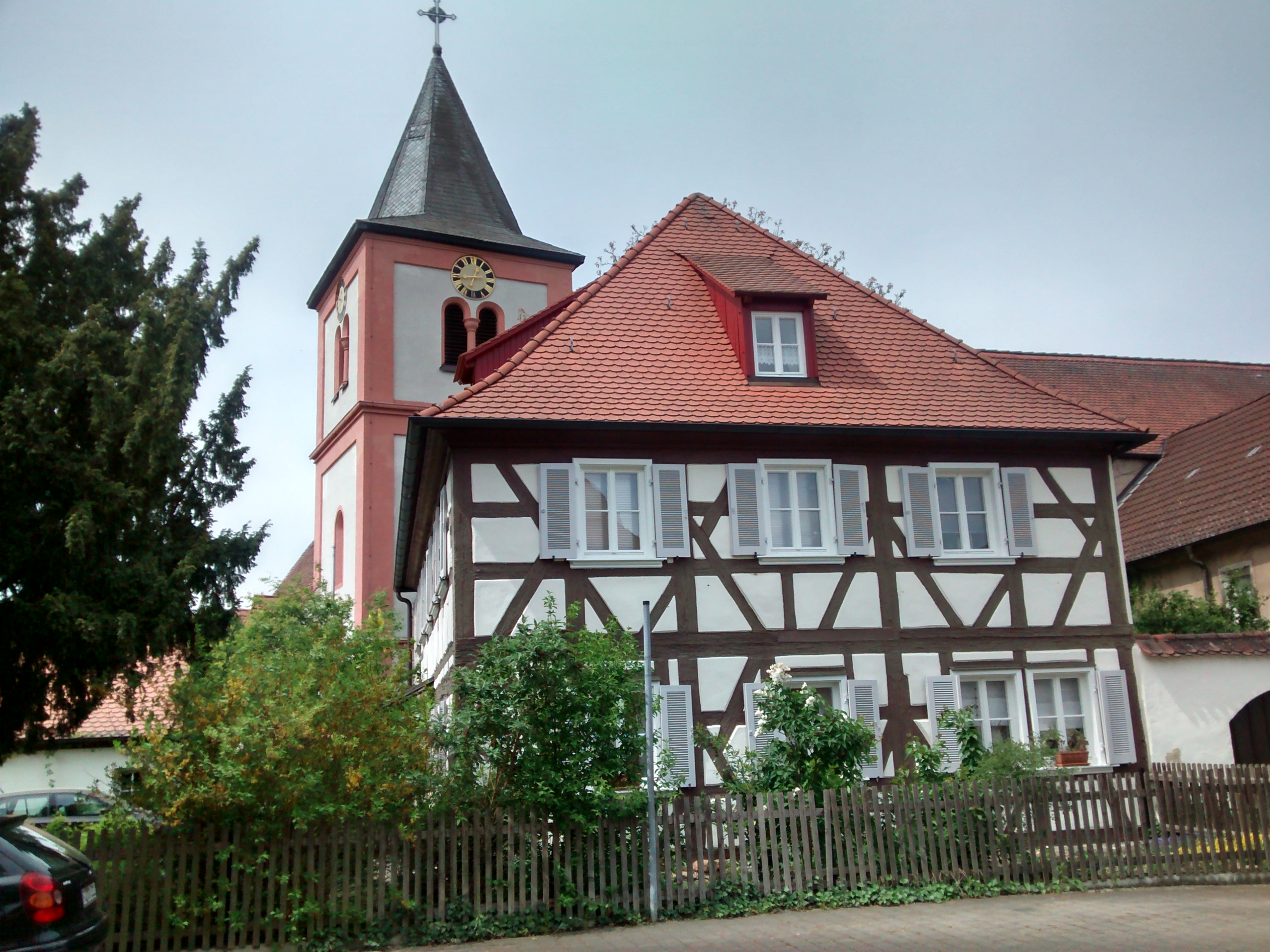 Pfarramt_Hagenbüchach